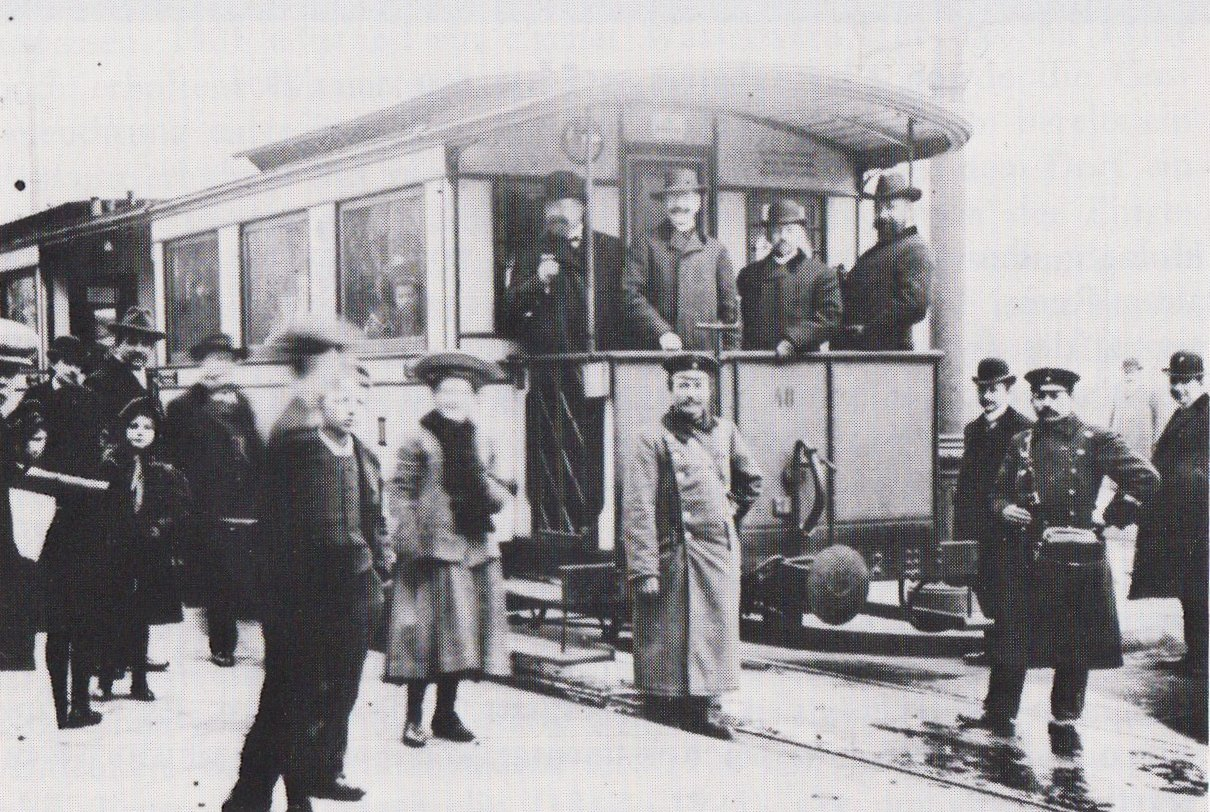 Blick auf eine Straßenbahn der Frankfurter Lokalbahn AG aus dem Jahr 1908 in Eschersheim